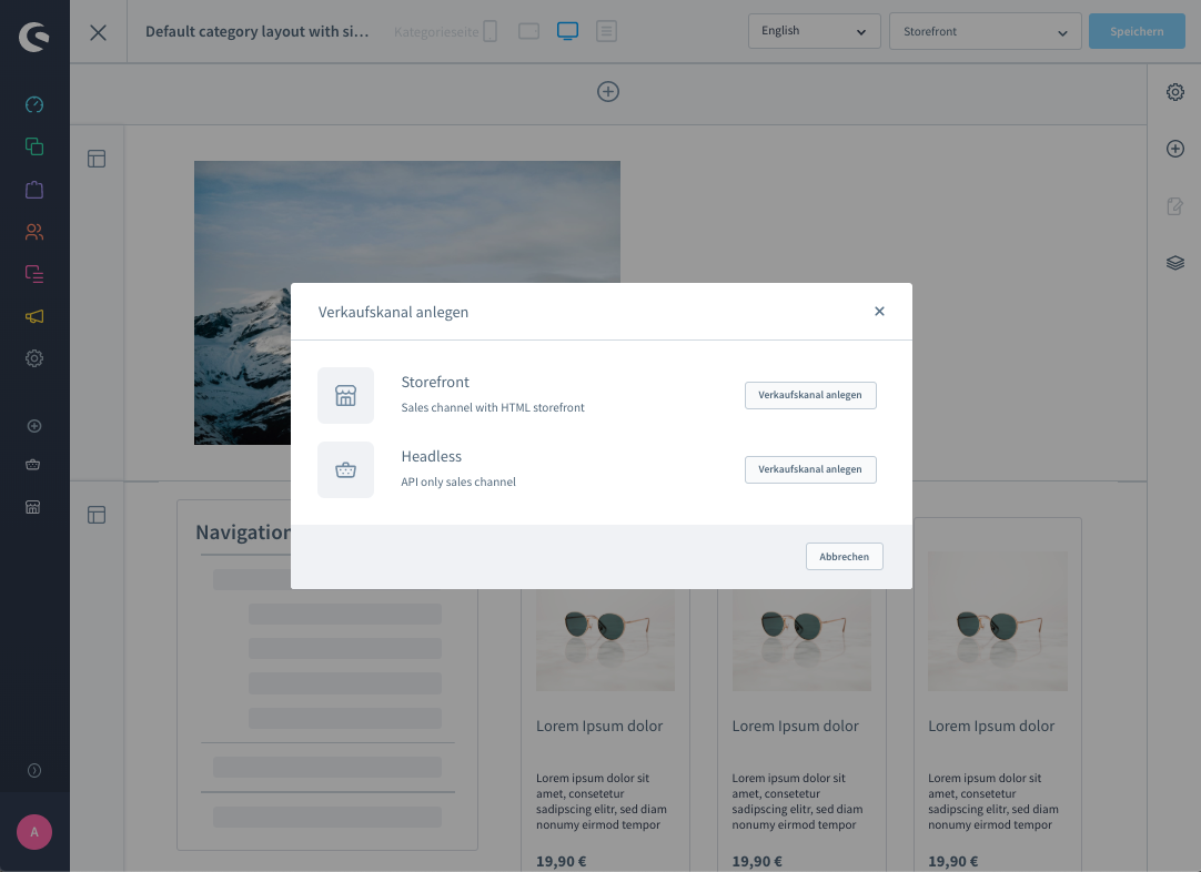 Zeit die Administrationsoberfläche von Shopware 6. Zu sehen sind die Erlebniswelten